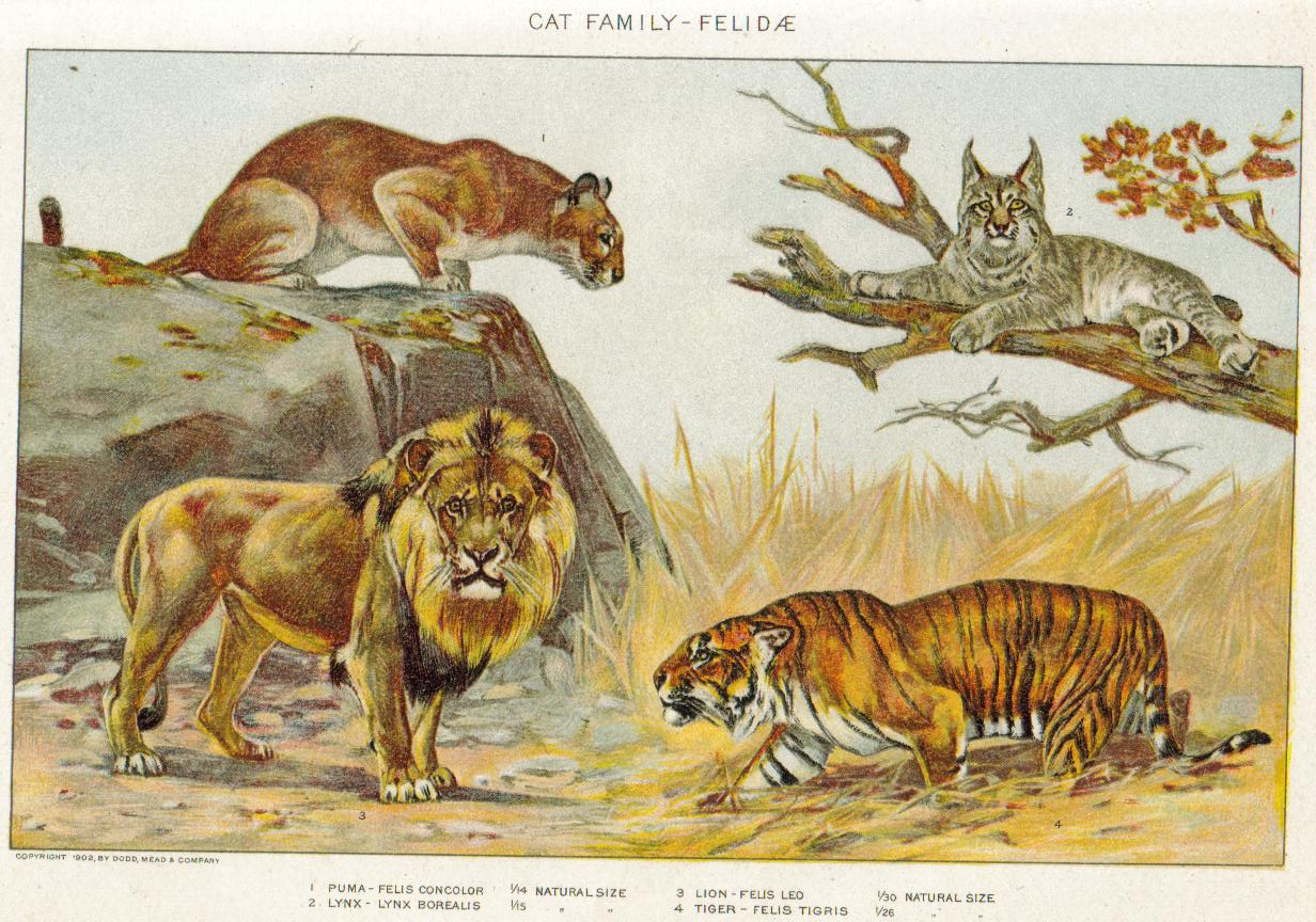 Painting